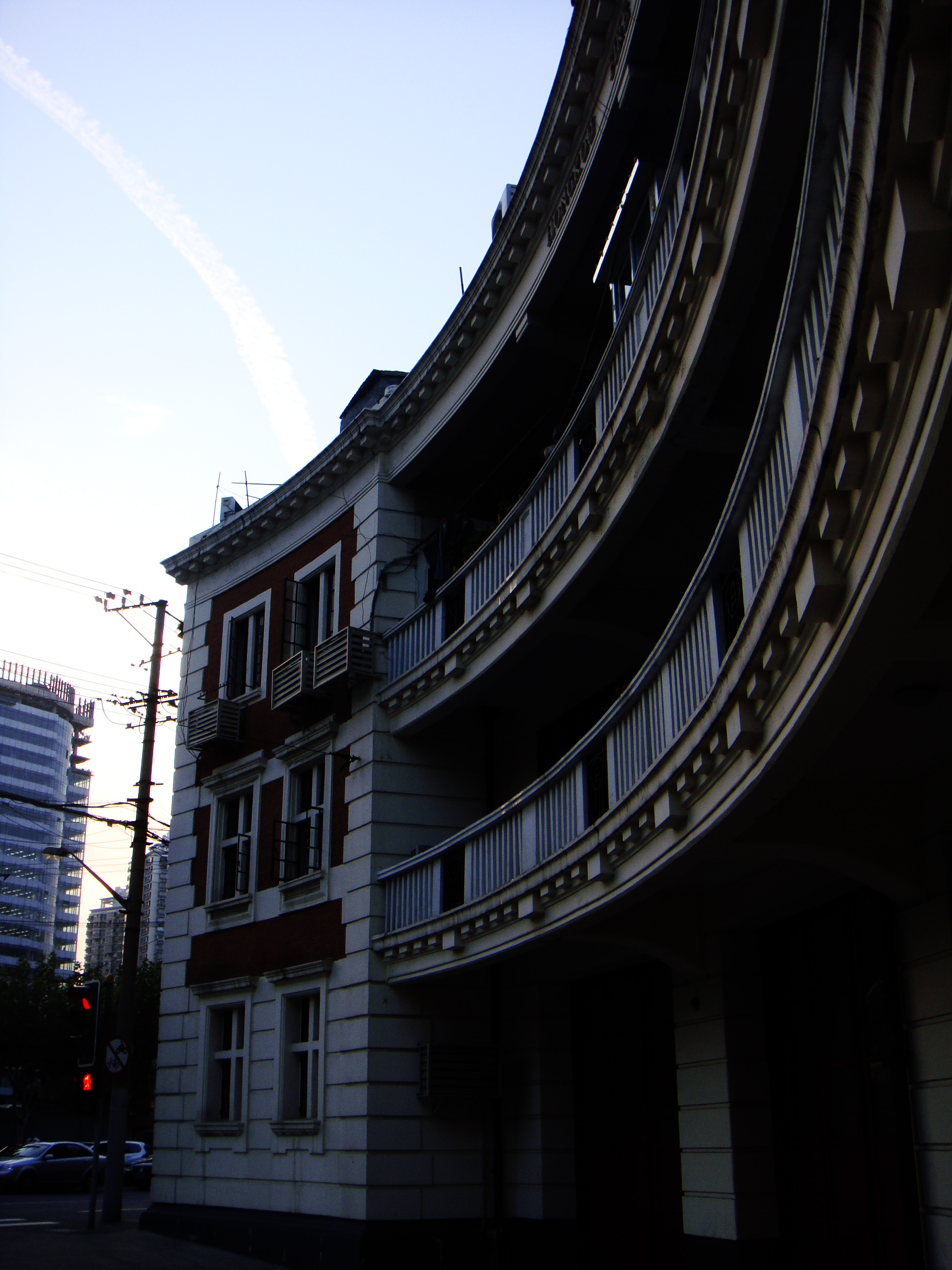 虹口救火会斜侧面